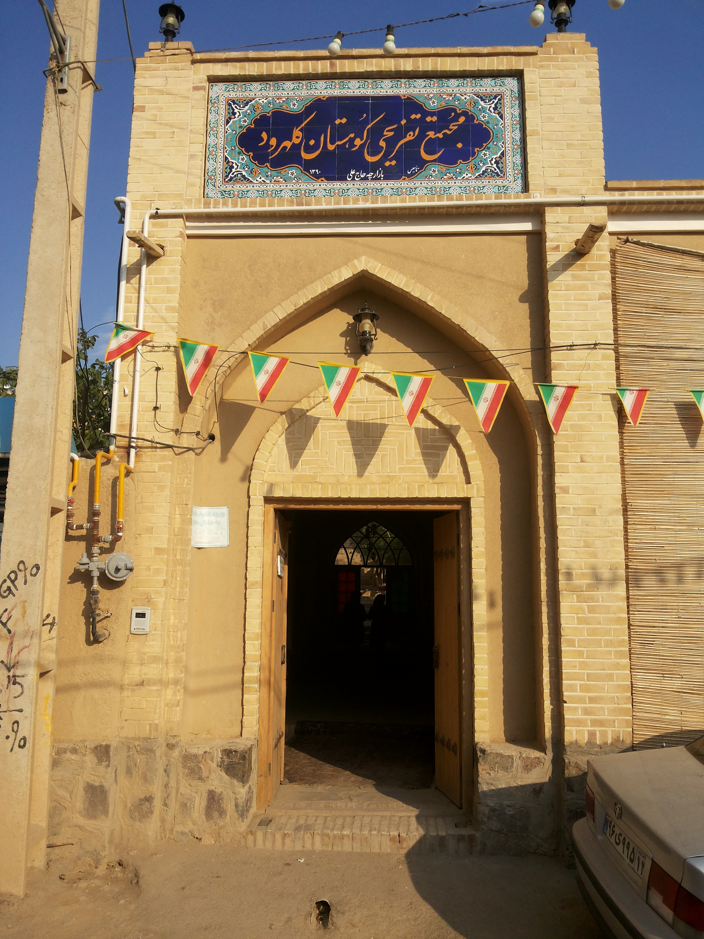 مجتمع تفریحی کوهستان کلهرود